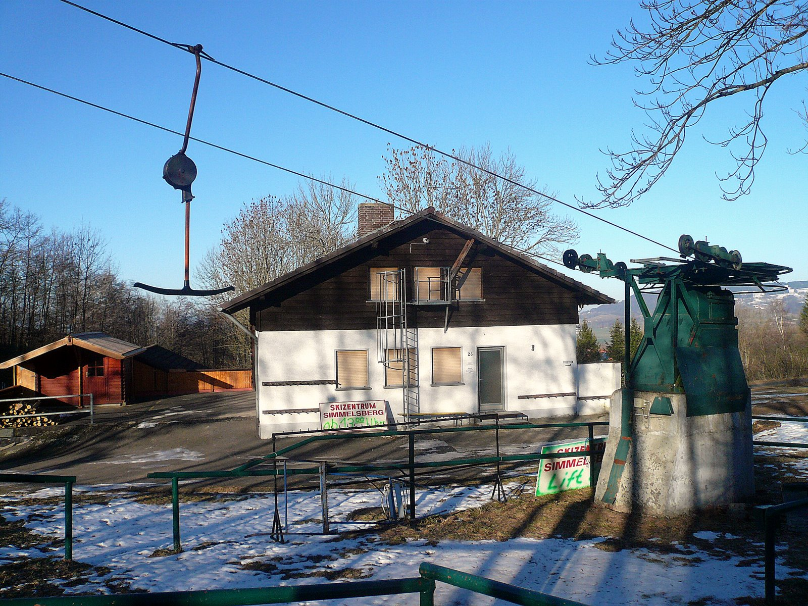 Skizentrum Simmelsberg